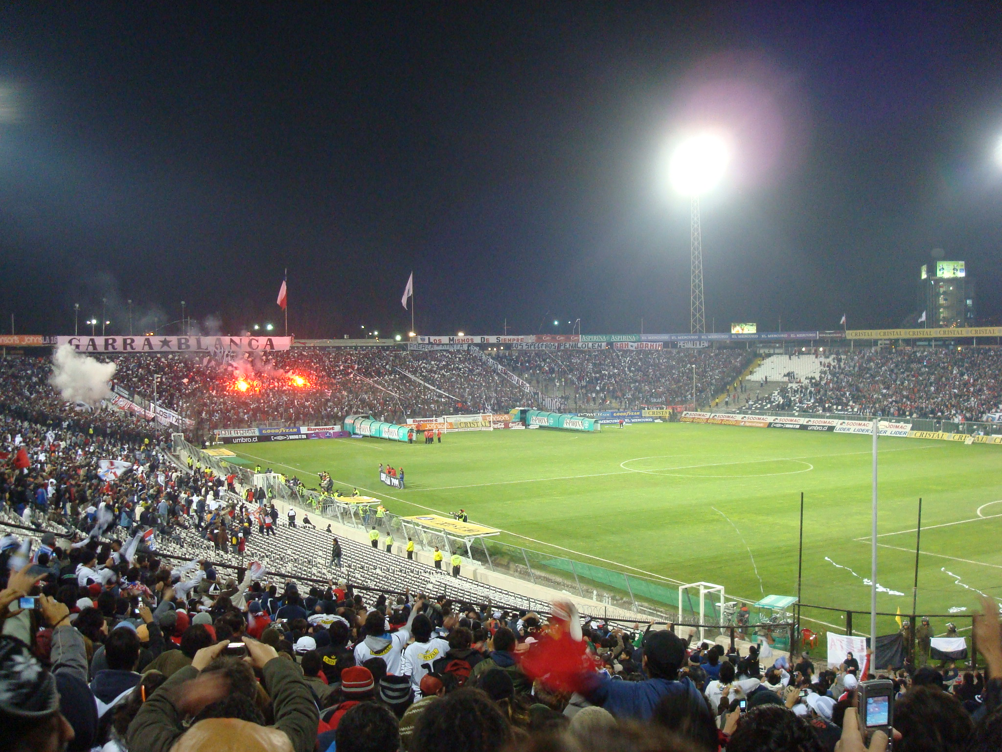 Primera final del Campeonato de Apertura 2008, entre Colo-Colo y Everton de Viña del Mar, jugada en el Estadio Monumental.